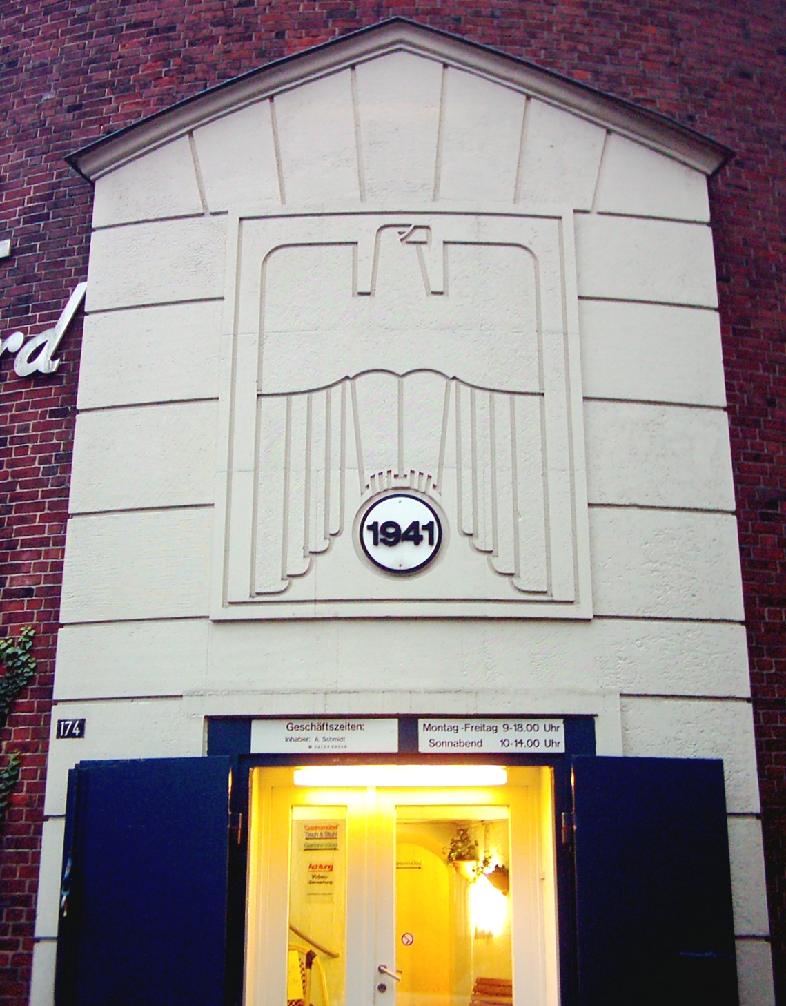 Reichsadler an einem ehemaligen Rundbunker der Bauart „Zombeck“ am Hasselbrook-Bahnhof in Hamburg-Eilbek.